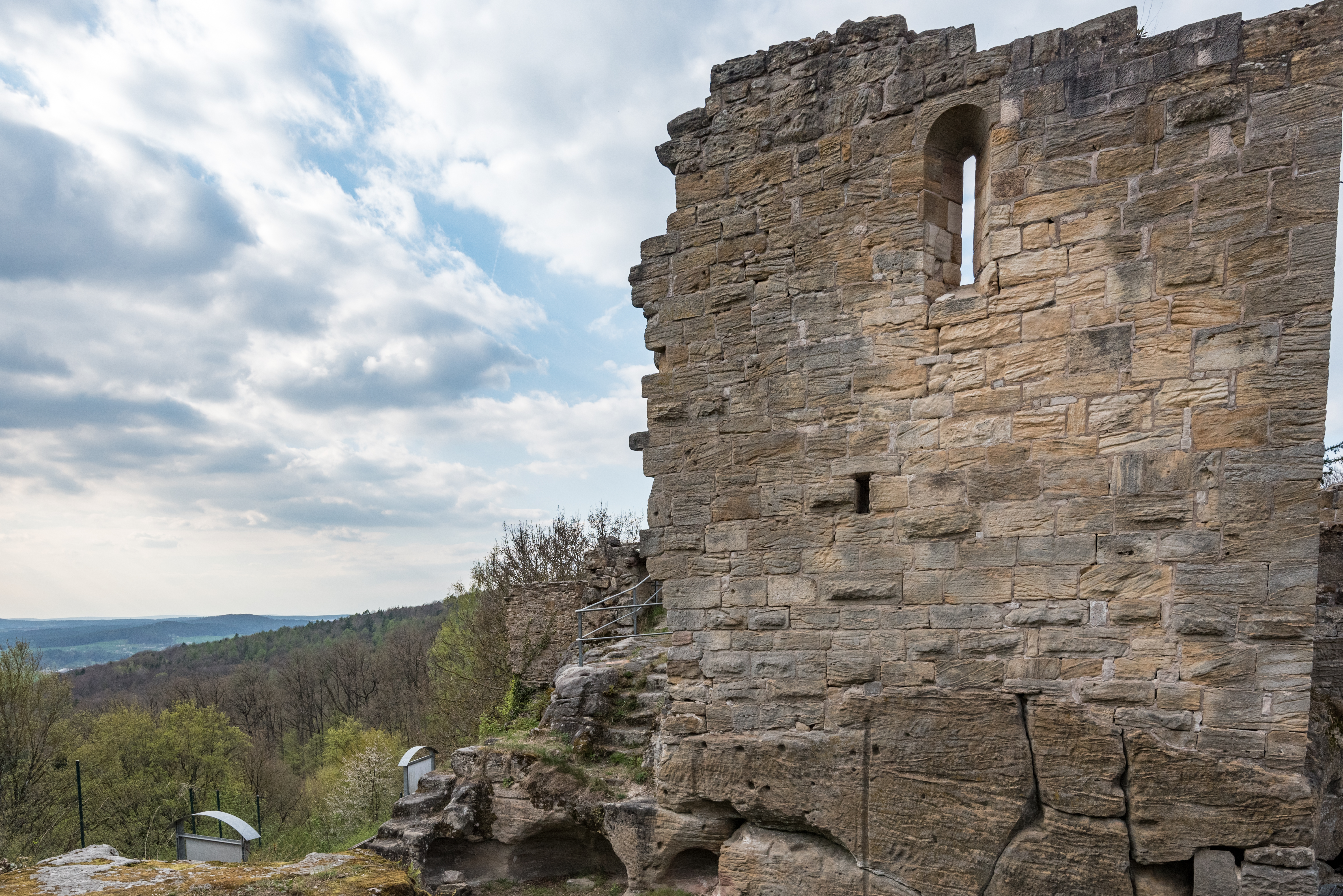 Pfarrweisach, Liechtenstein, Ruine der Nordburg